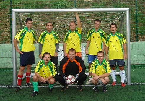 Palmeiro Dubnica